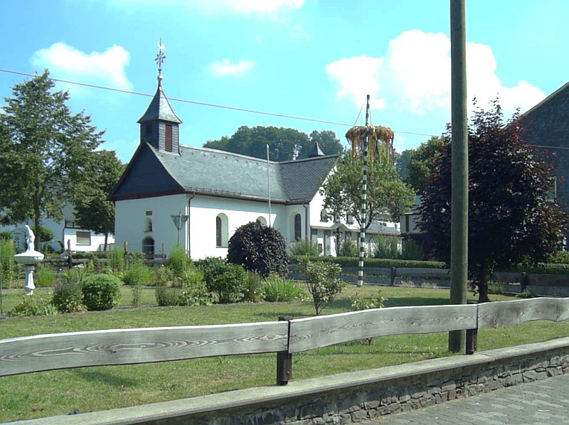 Niedersorpe Kapelle(Schmallenberg), Germany.